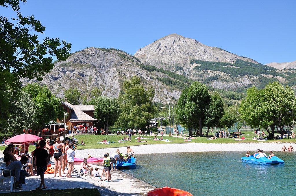 Allos, berge du lac